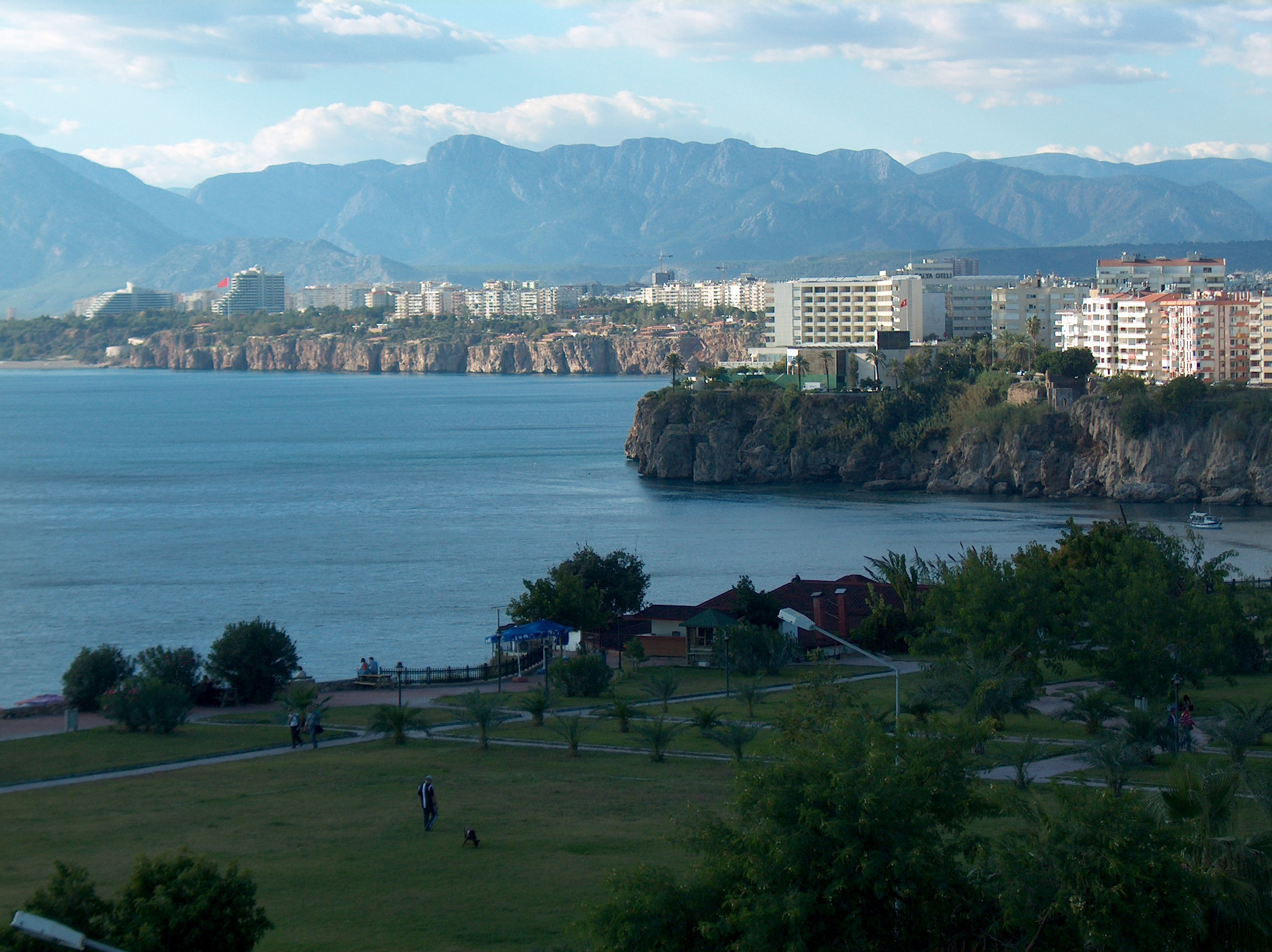 Antalya, Turkey.